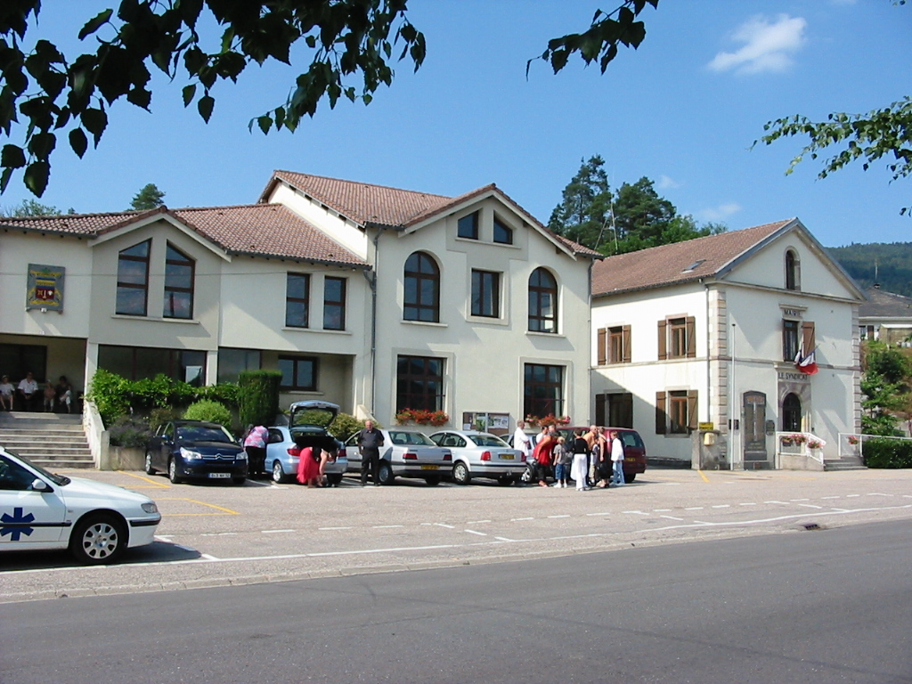 Le Syndicat Salle des fêtes et mairie Commune du canton de Remiremont (Vosges) Photo personnelle du 15 juillet 2006. Copyright © Christian Amet